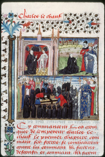 Apparition de Charles le Chauve et sa mise en sépulture à Saint-Denis. Châteauroux - BM - ms. 0005 (f. 154)